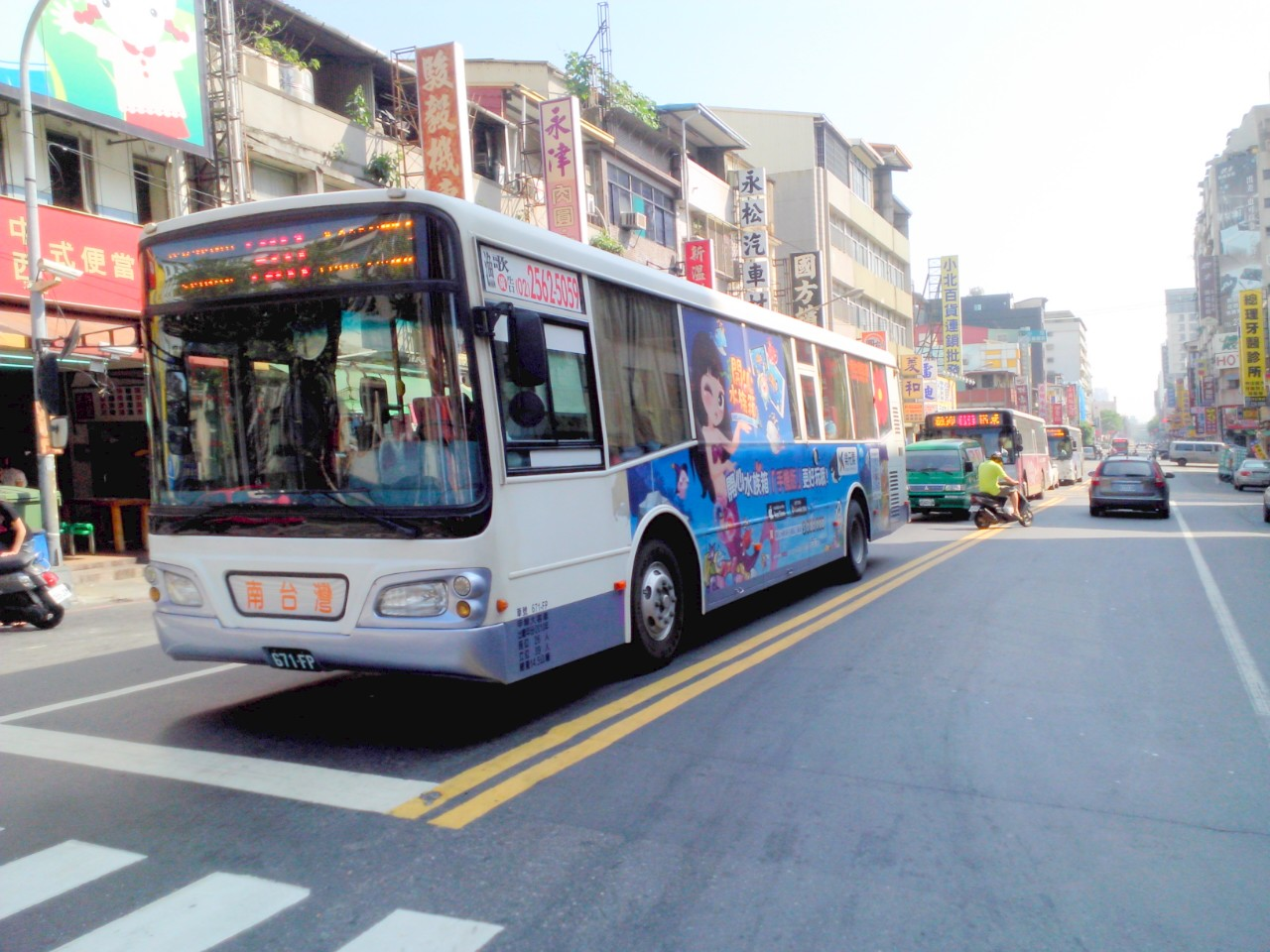 南台灣客運2010 HINO RK8JRSA 市區型 671-FP